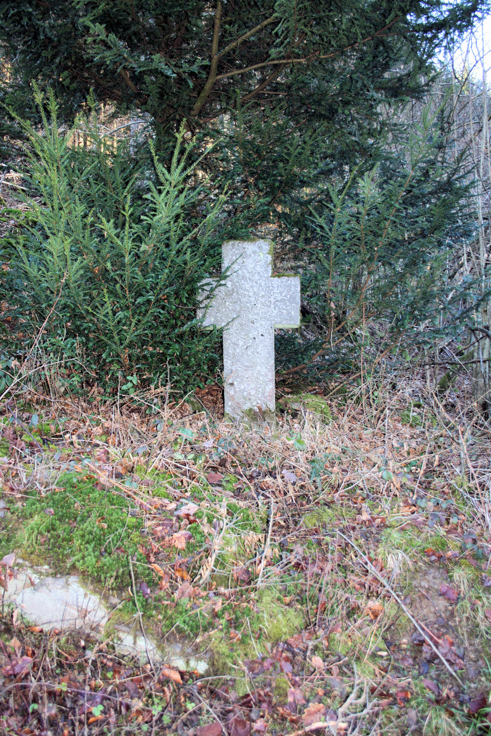 Weberkreuz Eitorf